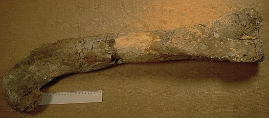 fémur mégalosaurus, Muséum d'histoire naturelle de Gray